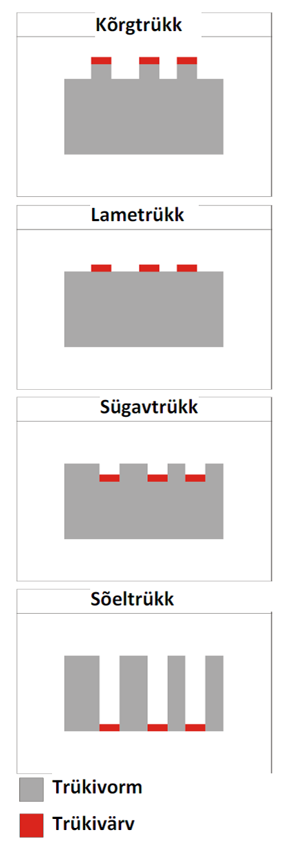 Tekst tõlgitud eesti keelde